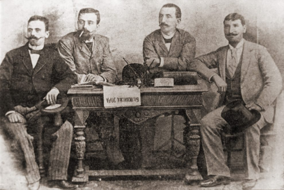 Редакционният екип на "Балканска зора". Д-р Никола Генадиев, Харитон Генадиев, Иван Стоянович, Владимир Неделев.